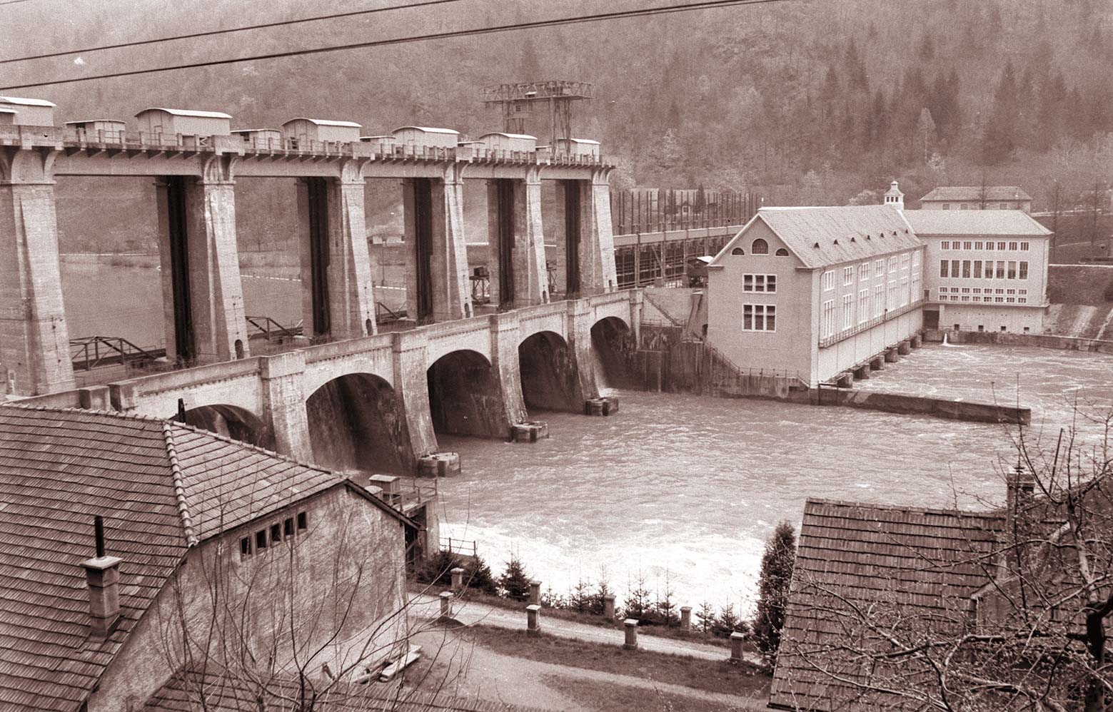 Hidroelektrarna Fala